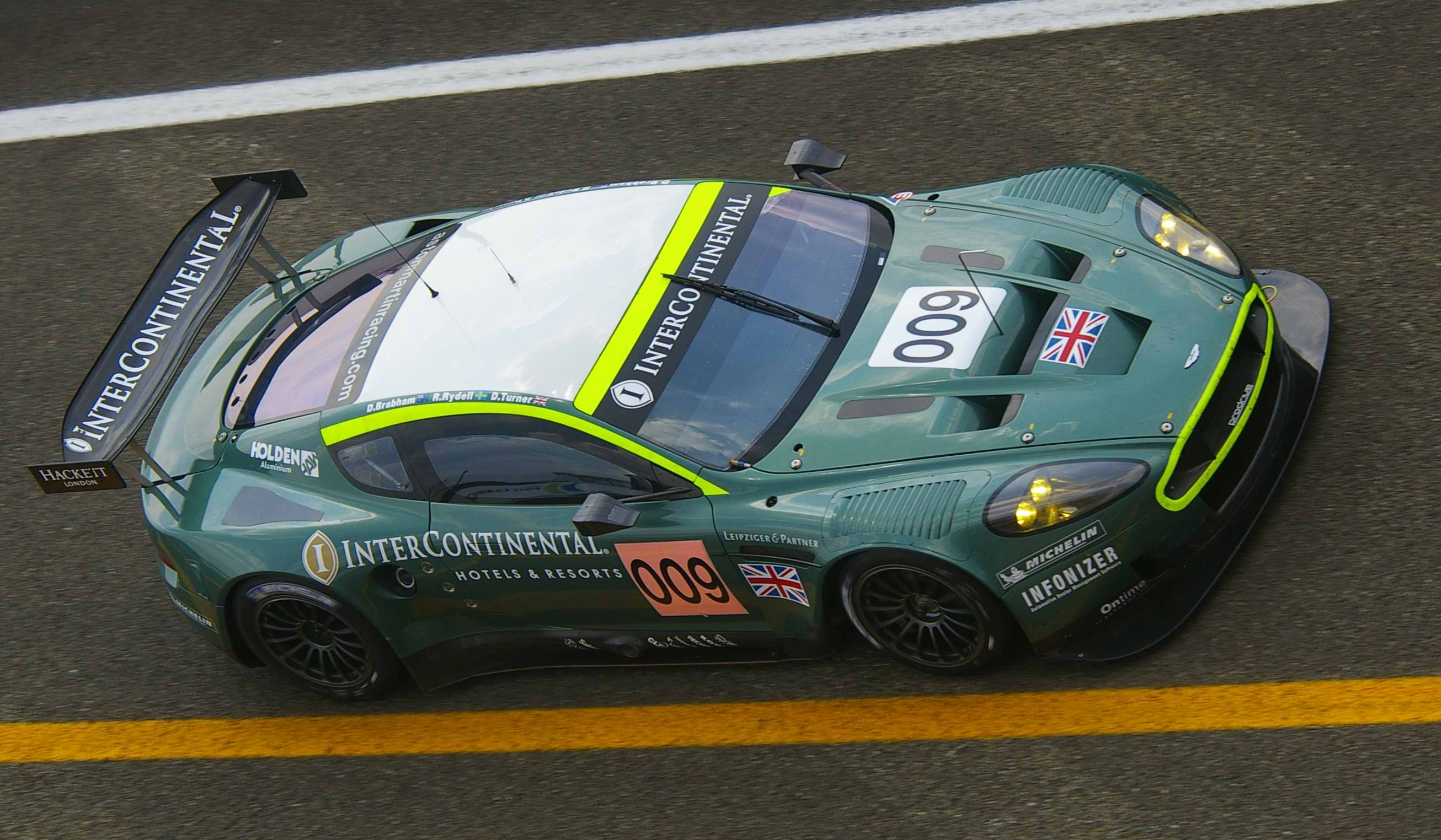 Entrée dans les stands de l'Aston Martin DBR9 de l'équipage 009 (David Brabham, Rickard Rydell et Darren Turner) lors de la journée test des 24h du Mans du 03 juin 2007.